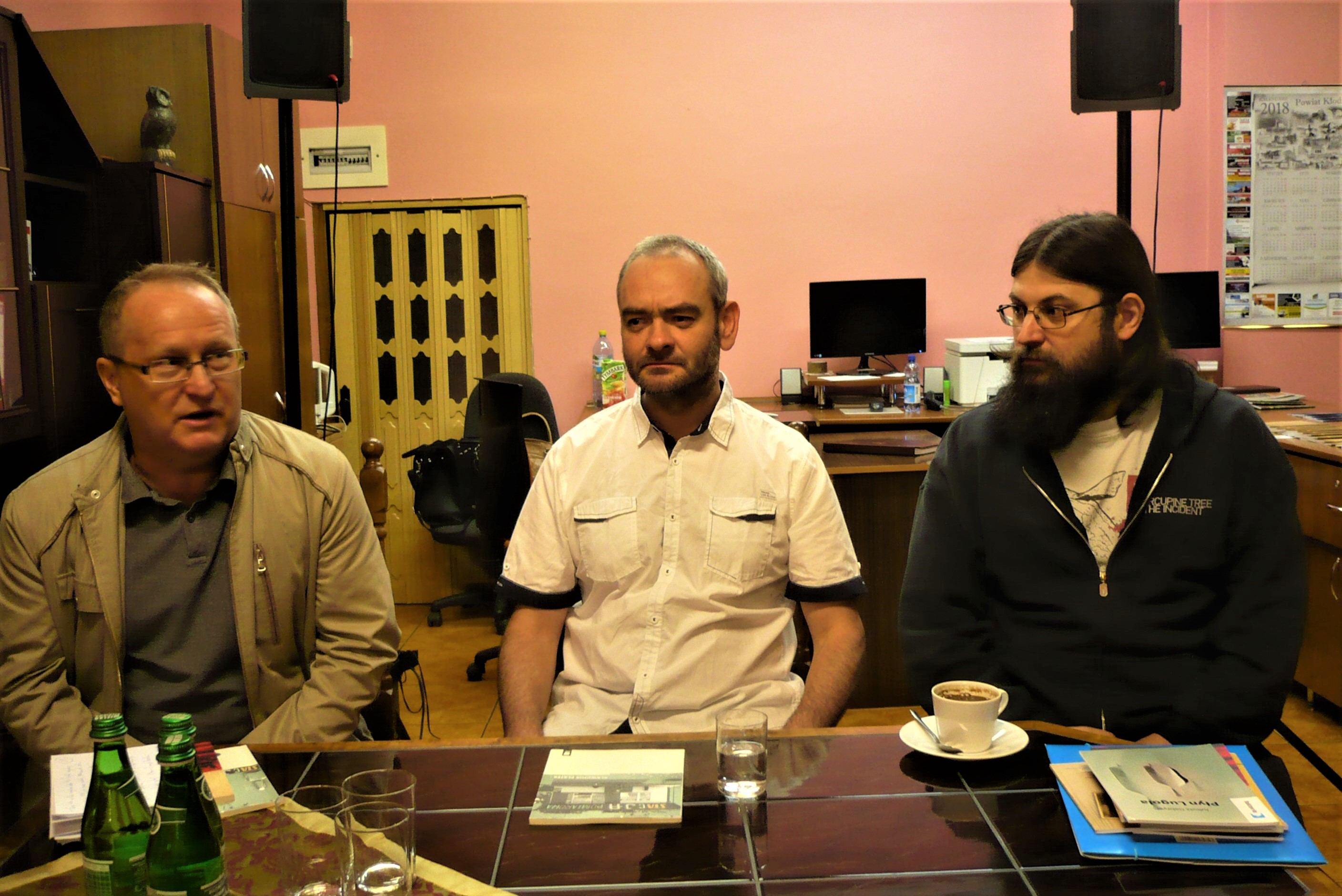 Poeci, od lewej: Karol Maliszewski, Sławomir Płatek, Radosław Wiśniewski w Nowej Rudzie.